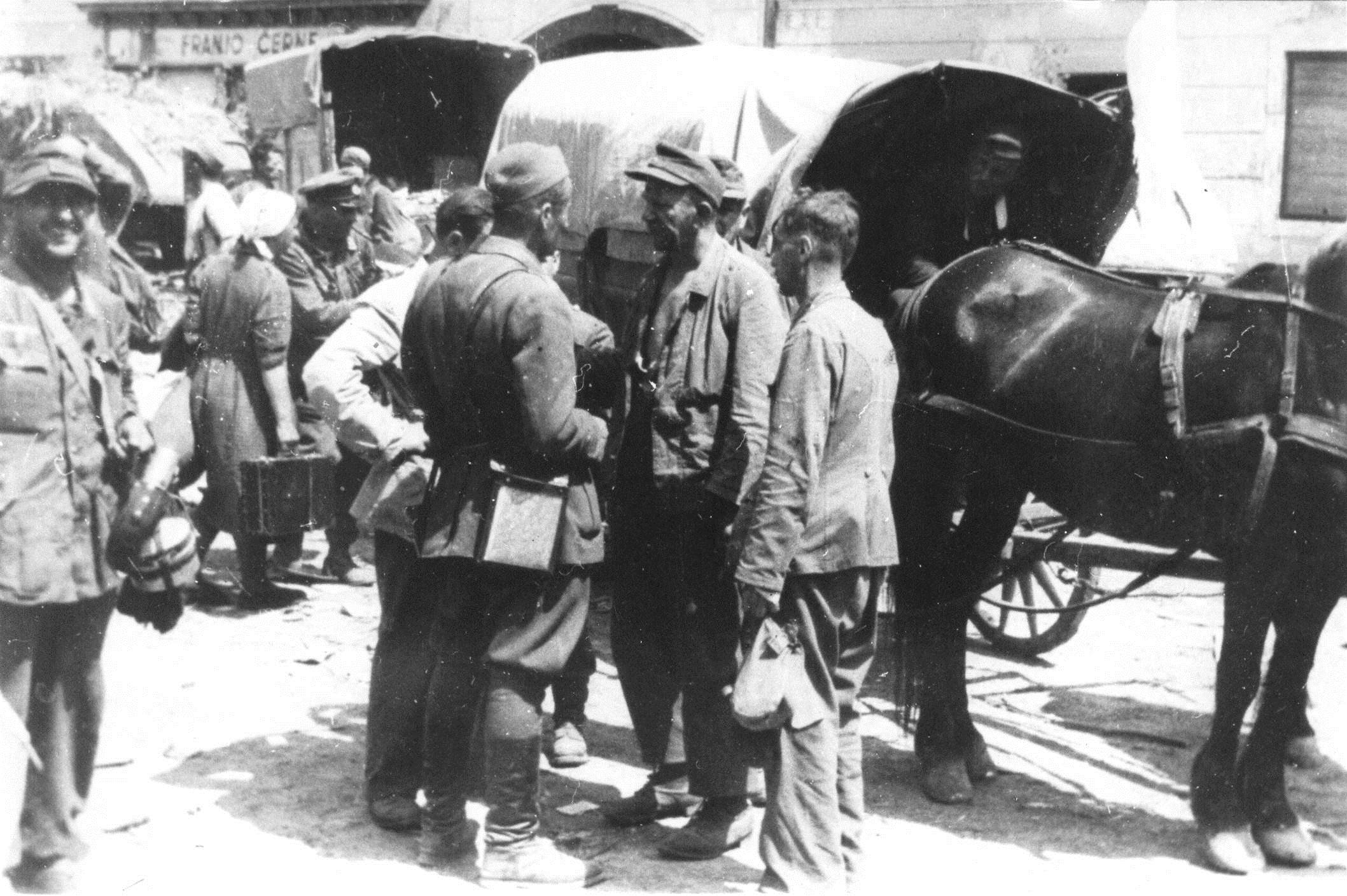 Srpskohrvatski / српскохрватски: Dušan Dragović - komandant 9. crnogorske udarne brigade u razgovoru sa zarobljenim neprijateljskim vojnicima, Zidani Most, maja 1945.